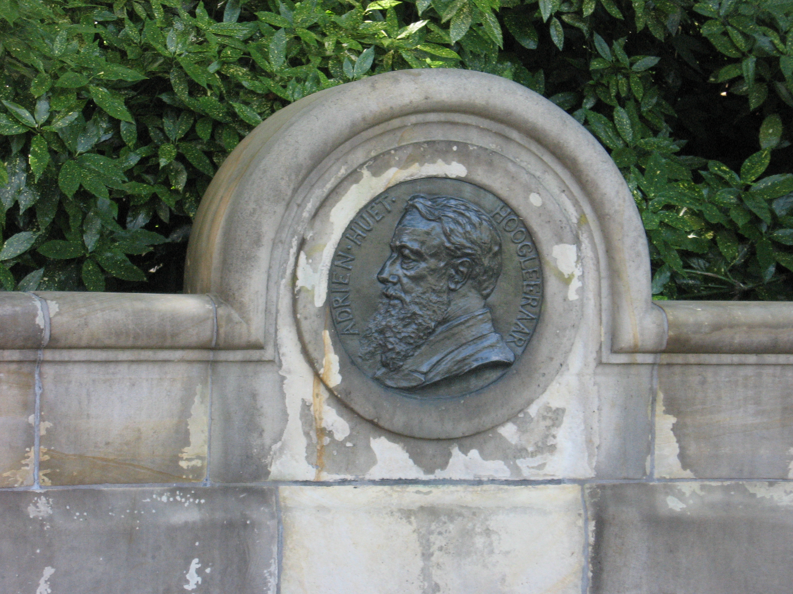 Plaquette op bank Kalverbos, Arend Odé